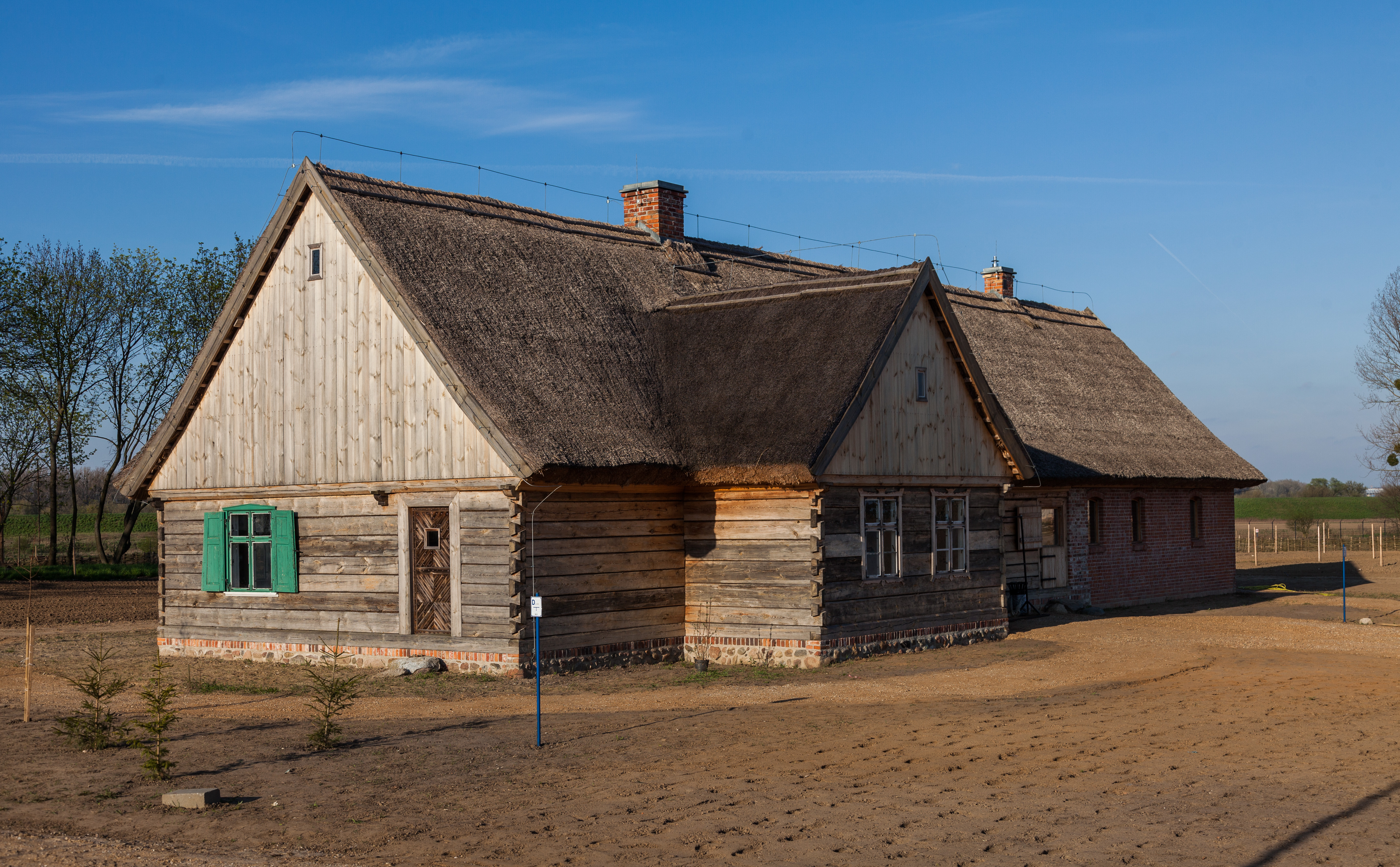 Olęderski Park Etnograficzny w Wielkiej Nieszawce k. Torunia w trakcie organizacji - stan z kwietnia 2017 r.